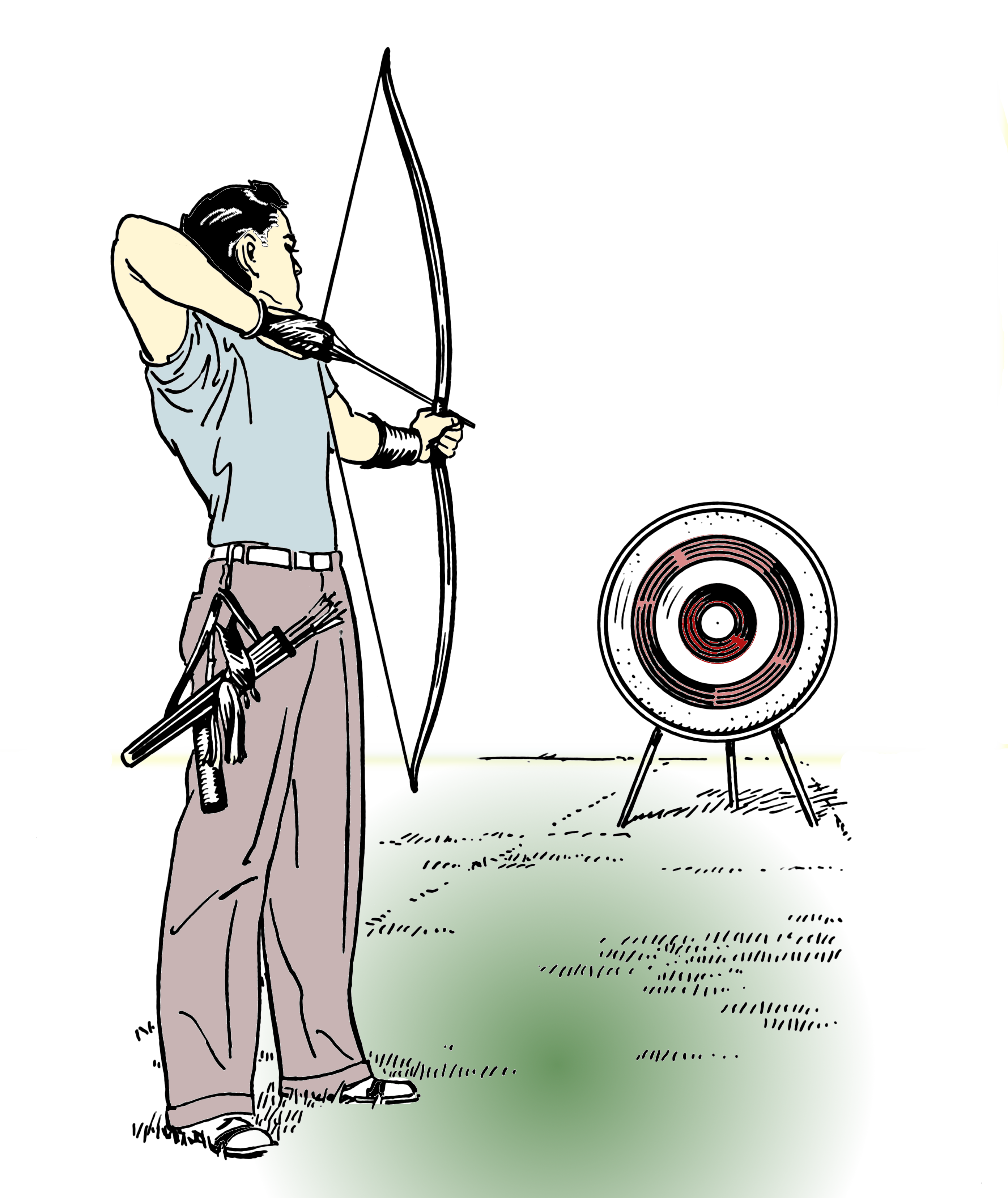 Archery